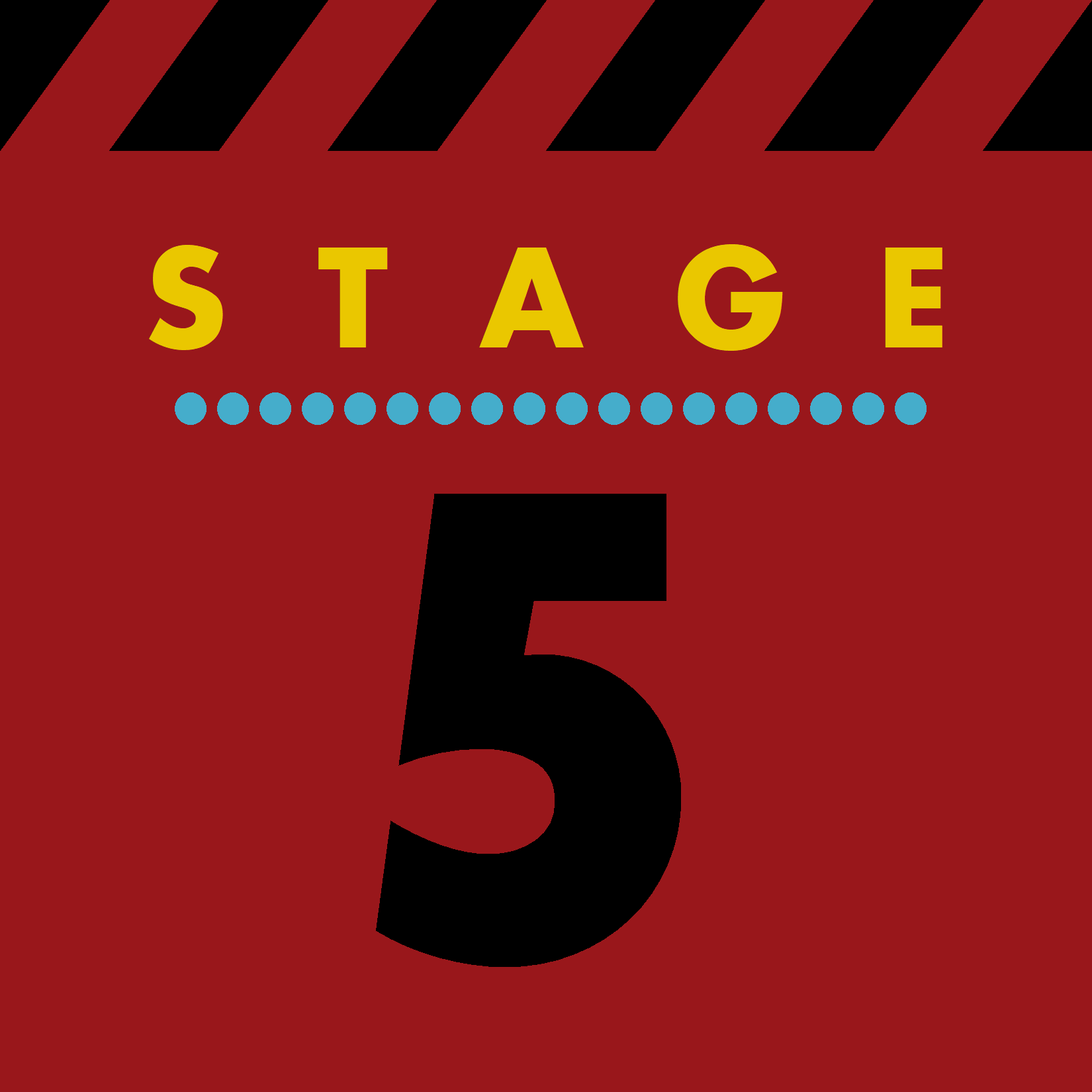 Logo du "Stage 5" Signalétique des différents studios qui composent le parc.